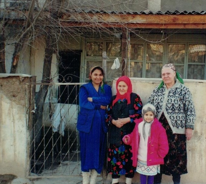 Үзбәкстан. Гузар. Башҡортостан сығышлы ғаилә